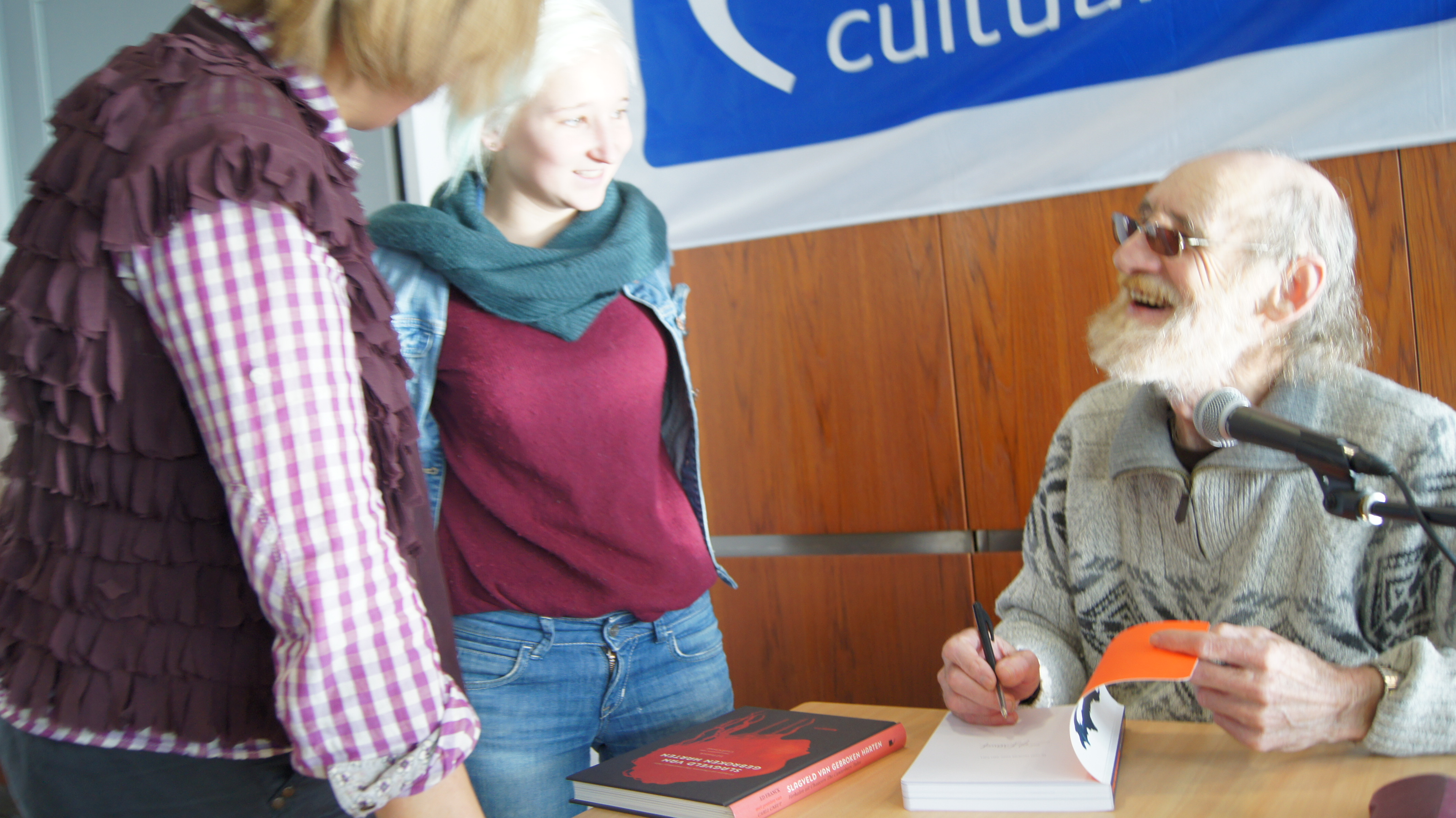 Ed Franck, auteur